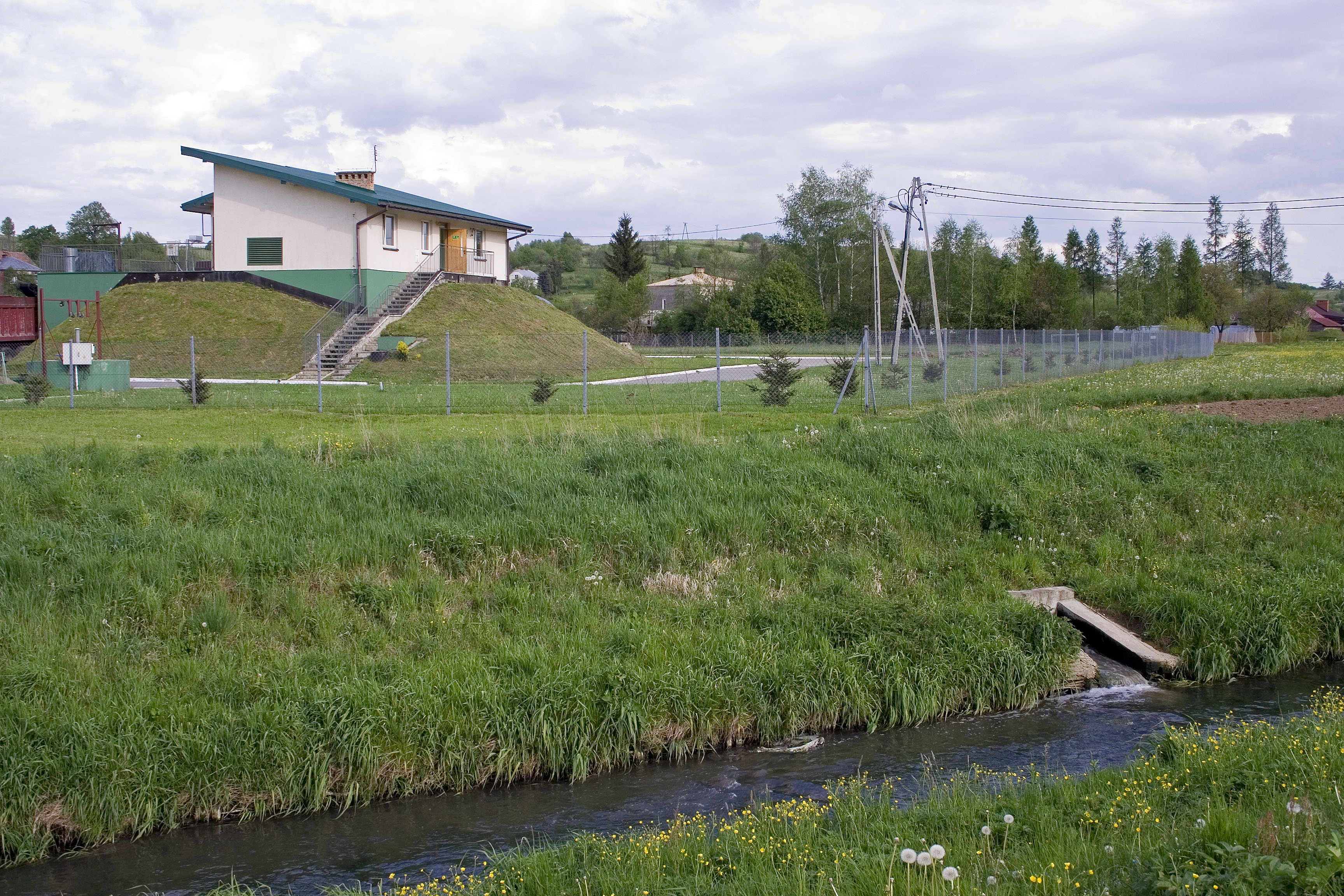 Oczyszczalnia ścieków biologiczno-mechaniczna „Brzozów-Borkówka” w Brzozowie.